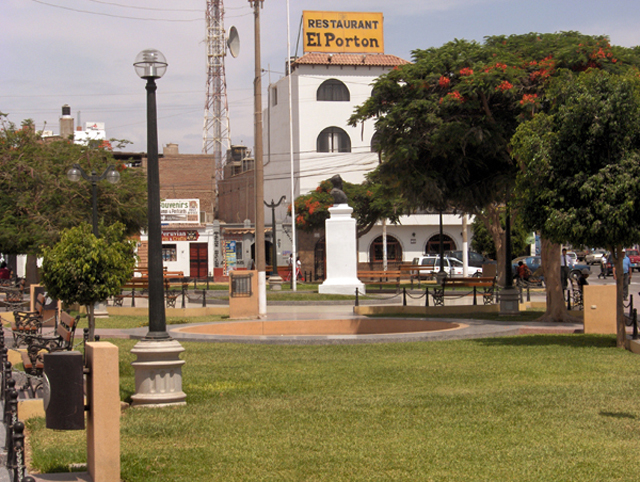 Plazuela Francisco Bolognesi, centro de la ciudad de Nasca (Ica-Perú).